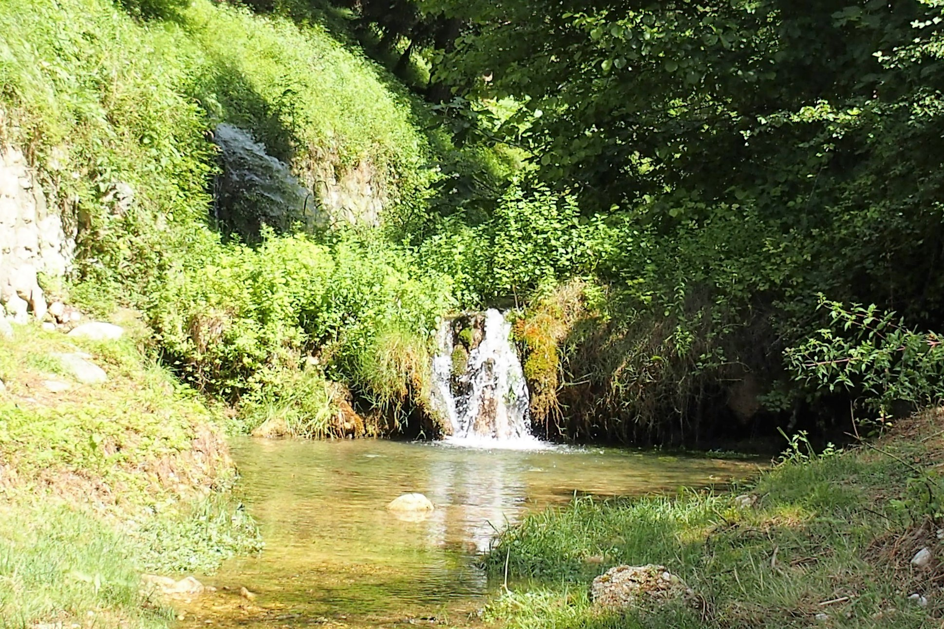 Monte Baldo: Val dei Mulini, (Q49963121)